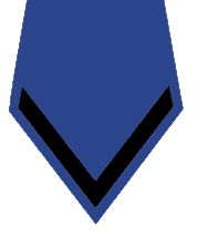 Insignia de rangos militares